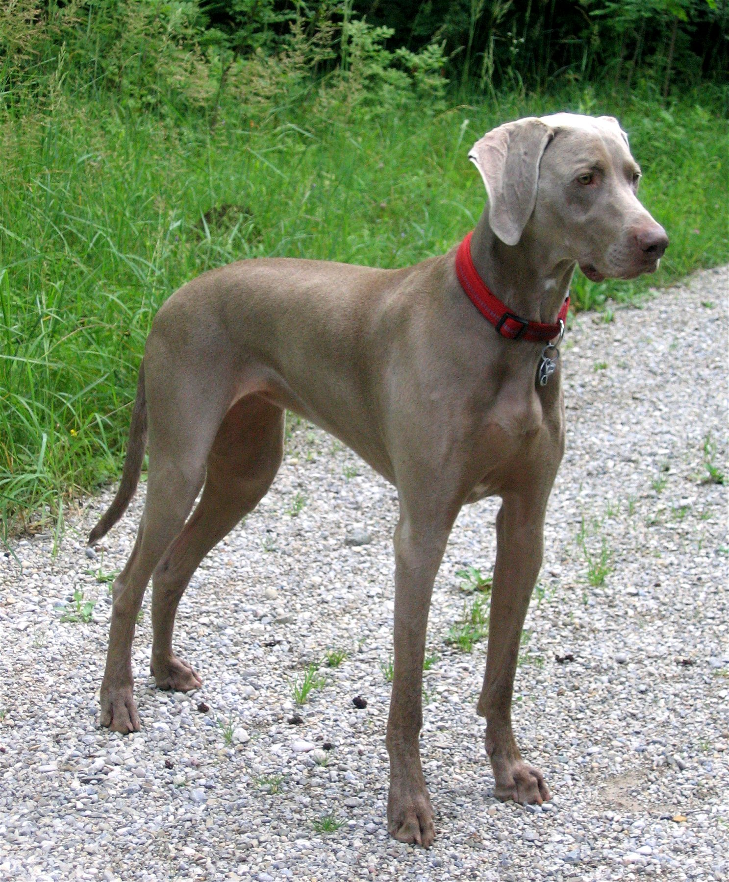 Weimaraner-Hündin, zwei Jahre alt